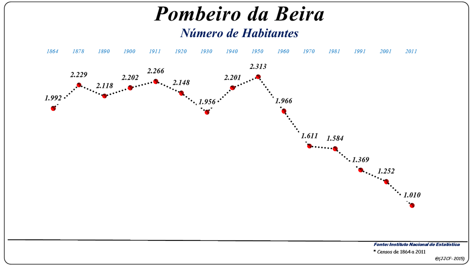 População